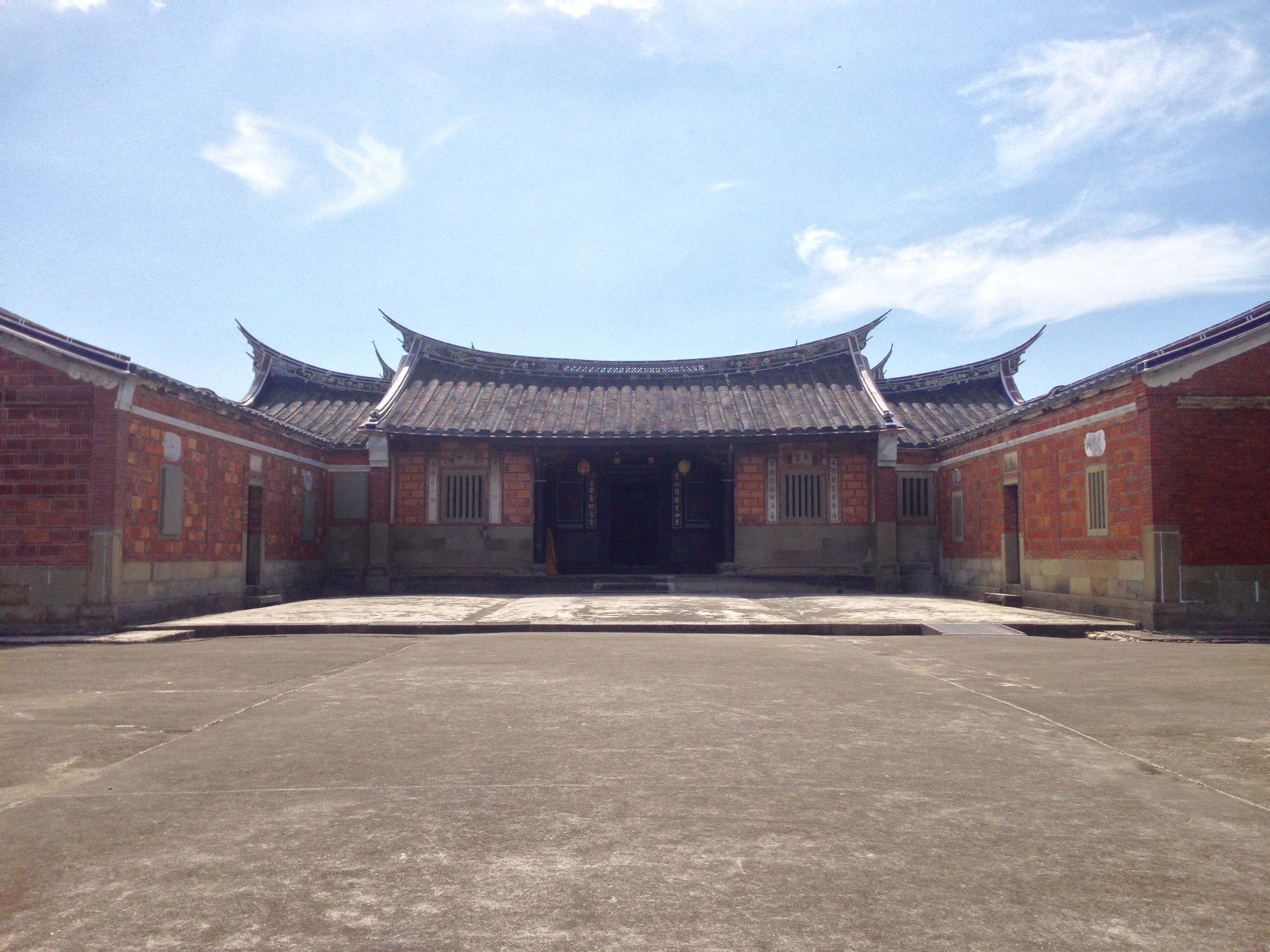 中文（台灣）: 桃園市立大溪木藝生態博物館李騰芳古宅正面照